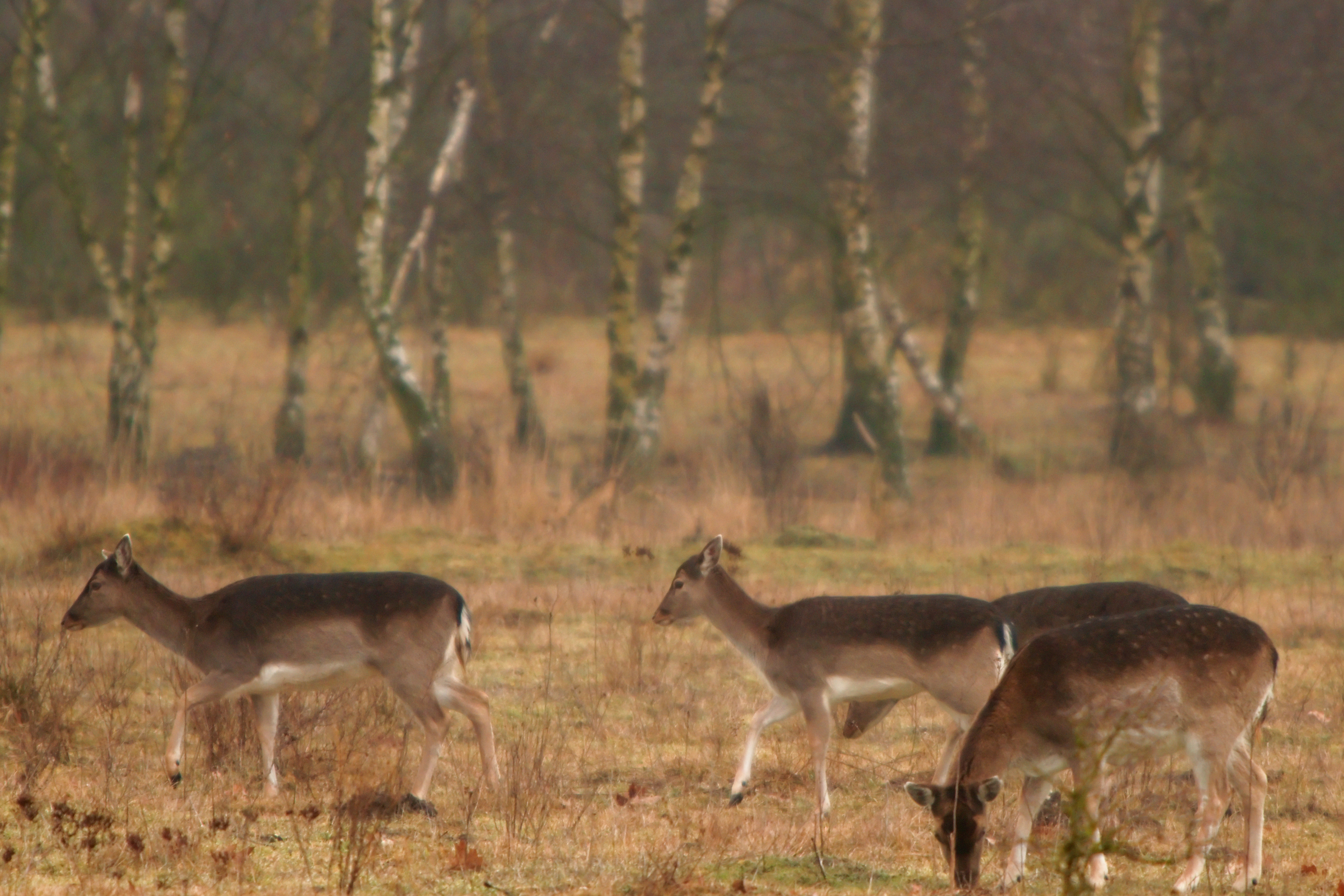 Deer at the Utrechtse heuvelrug